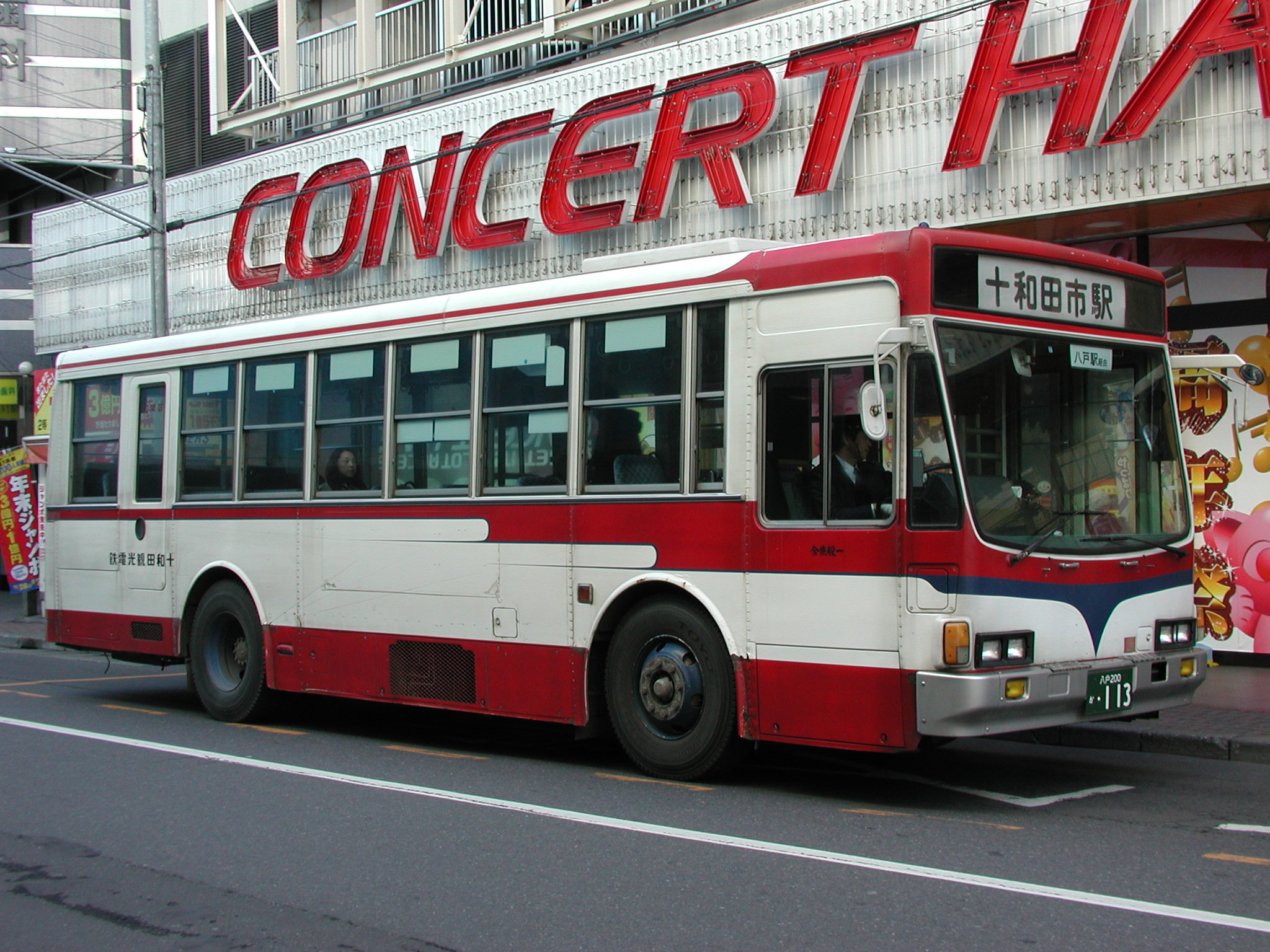 十和田観光電鉄バス 一般路線塗装：オリジナルカラー（いすゞ・キュービック：P-LV314K/元：国際興業） 六日町バス停（八戸市）付近にて